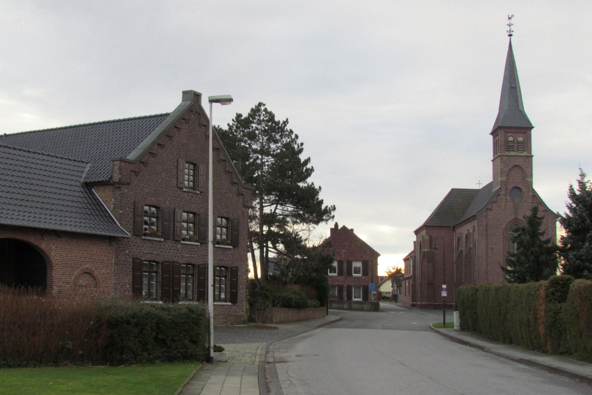 Ortsblick in Tripsrath mit St. Anna